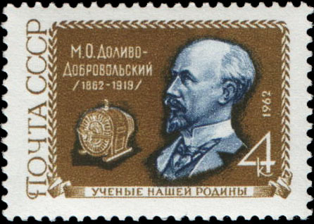 Почтовая марка СССР из серии «Ученые нашей Родины», выпущенная к 100-летнему юбилею Доливо-Добровольского Михаила Осиповича. На марке изображён портрет учёного, генератор переменного тока. Художник — Н. Круглов. Номер (ЦФА) — 2654. Тираж — 5 млн экз.